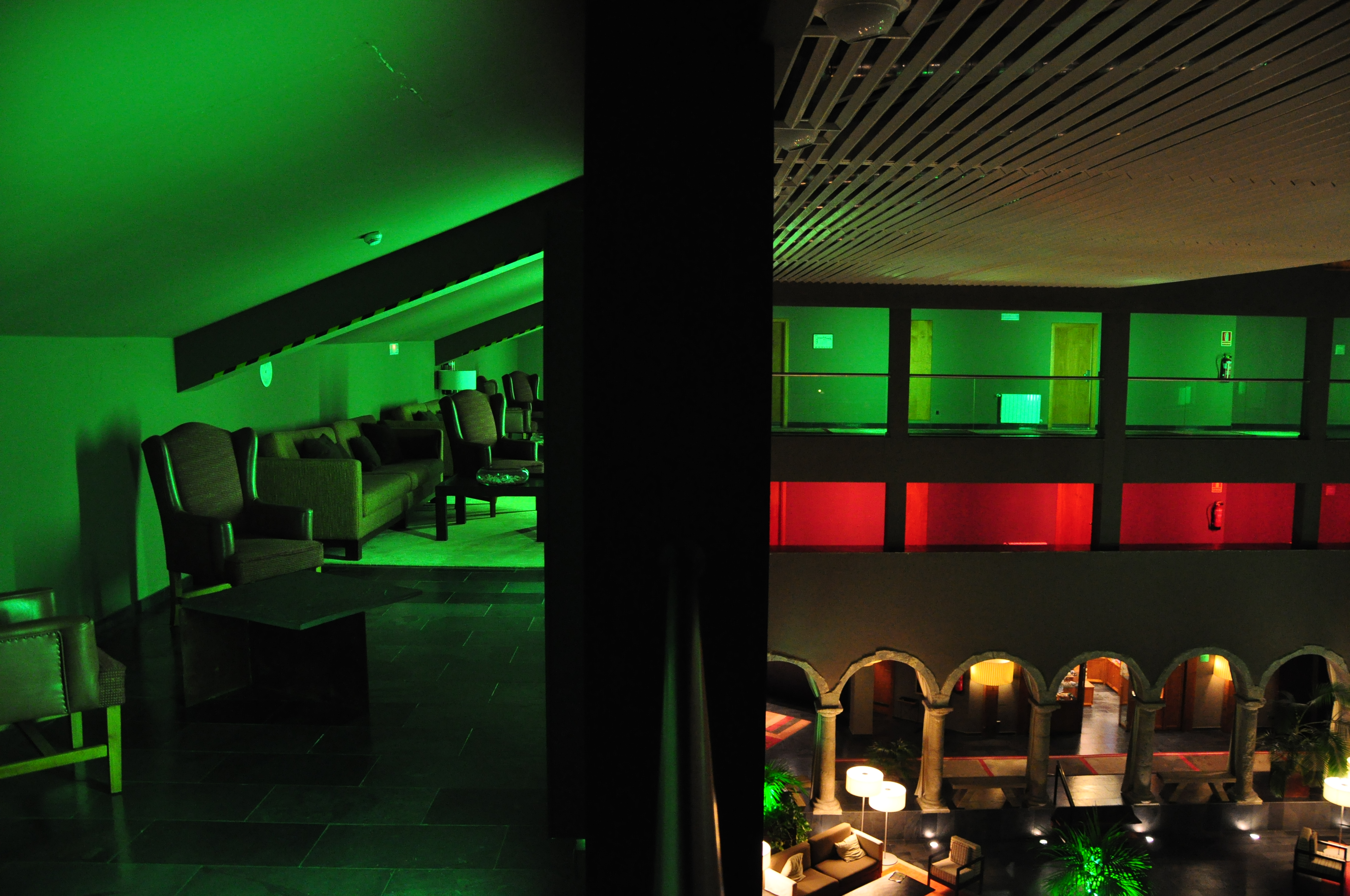 El Parador Nacional de la Seu d'Urgell és un allotjament turístic de tres estrelles situat al centre històric de la Seu d'Urgell.